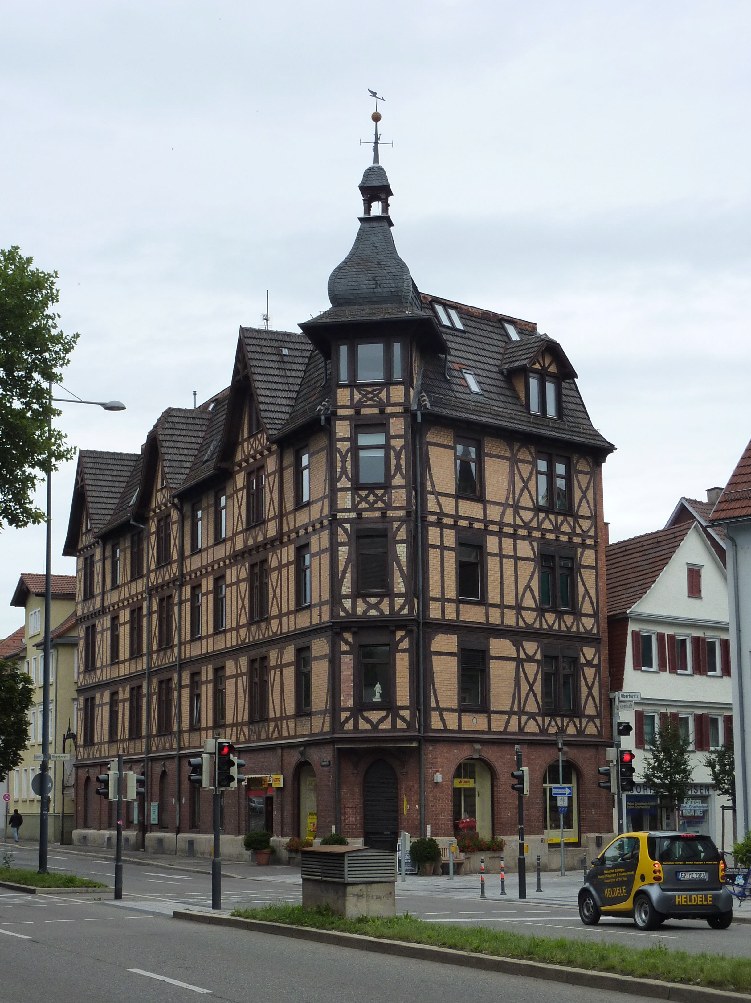 Eckhaus Obertor- und Kiesstraße, Esslingen